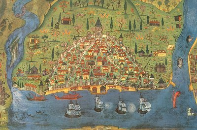 Karte von Pera aus dem 16. Jahrhundert